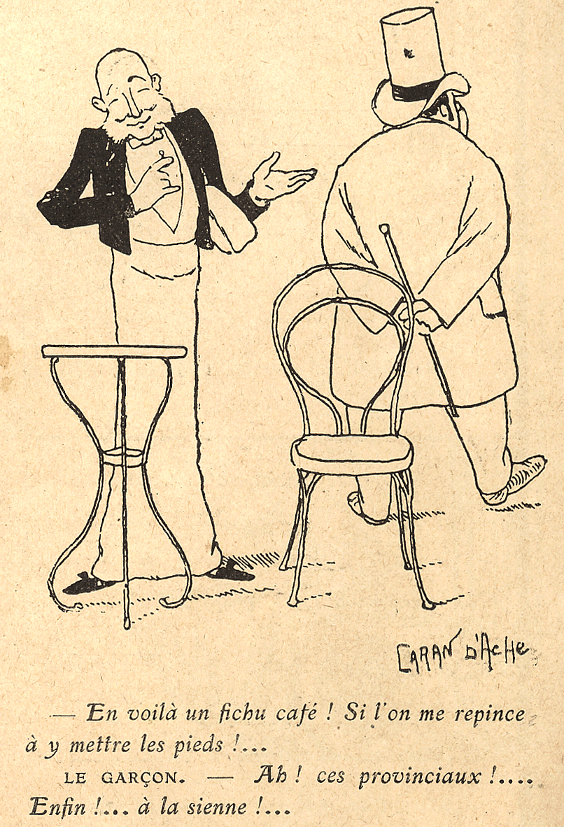 Illustration de Caran d'Ache telle que parue en 1925 dans le Guignol des Annales.